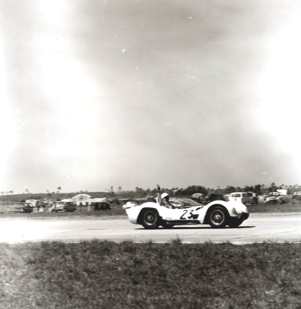 La Maserati Tipo 61 qu'a piloté Stirling Moss et Graham Hill aux 12 Heures de Sebring en 1961.